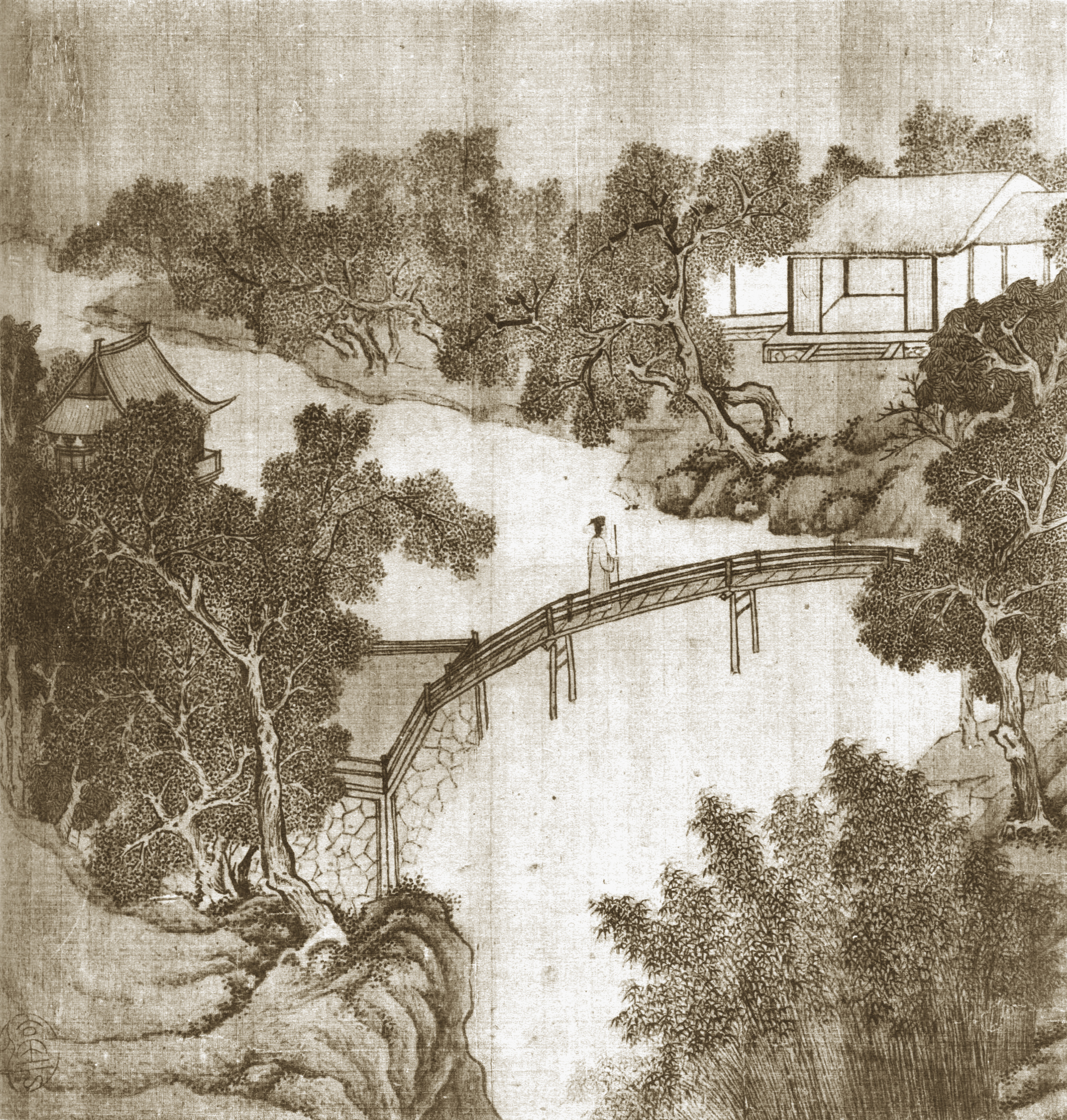 明文徵明拙政园图咏册页之小飞虹（与今拙政园中部小飞虹位置不同）